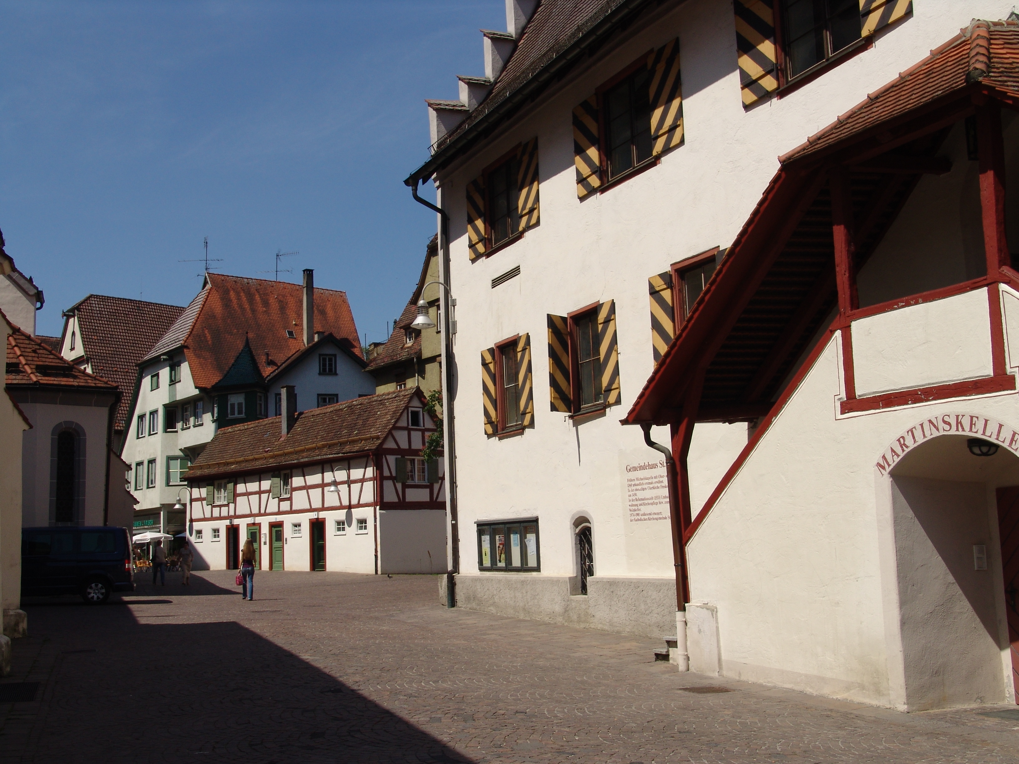 Historische Gebäude in der Altstadt von Biberach an der Riß